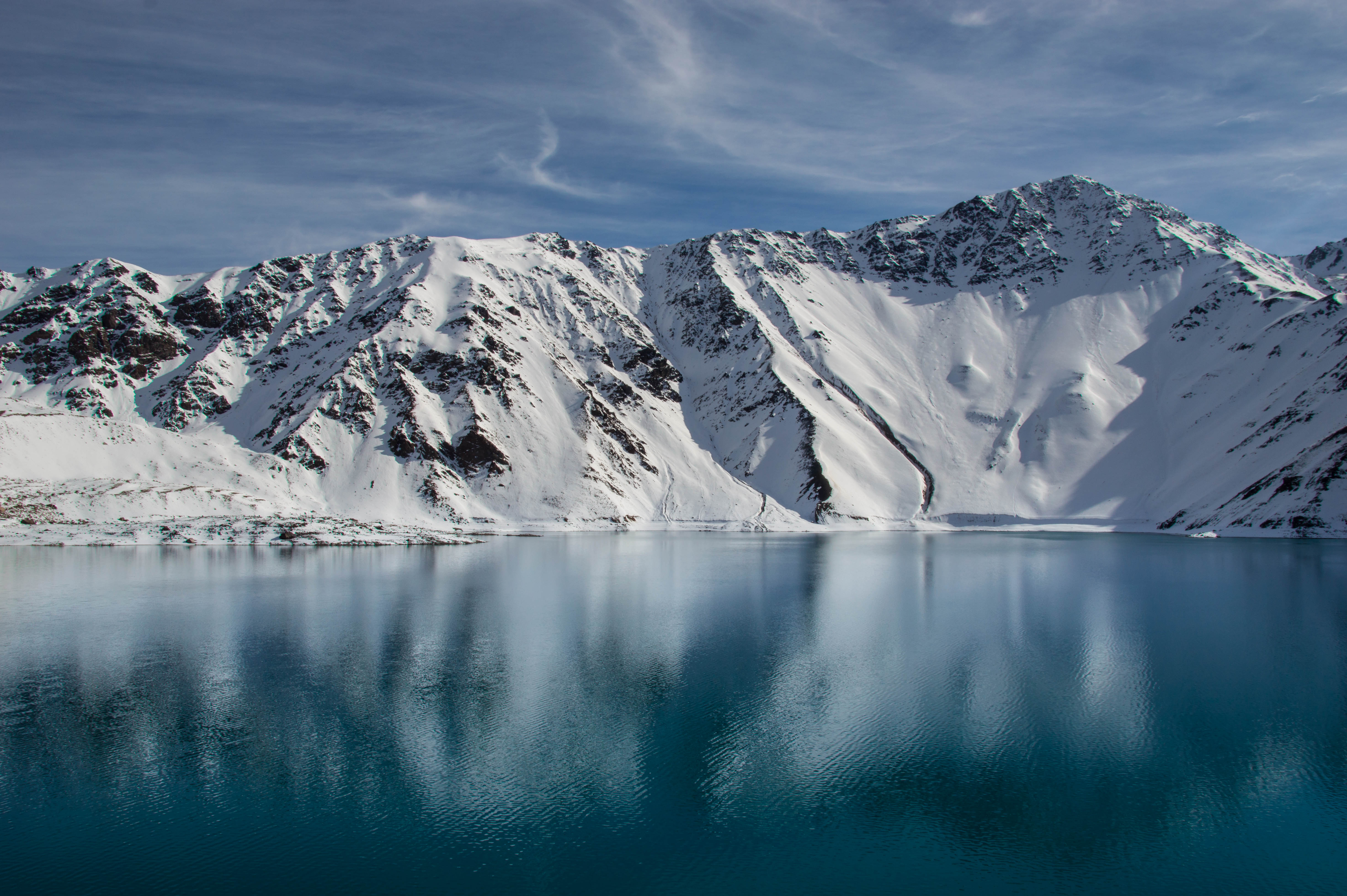 Ambiente Montanhoso Andes Lago Artificial Maipo Chile